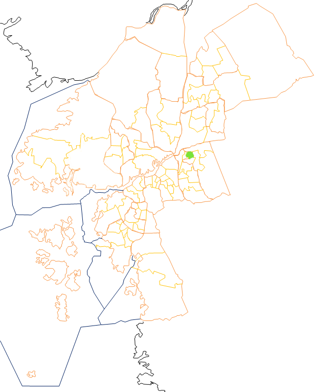 Karta som visar primärområdes belägenhet i Göteborg